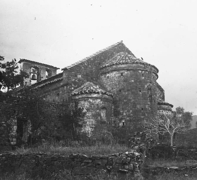 Absis de l'església romànica del Sant Sepulcre de Palera